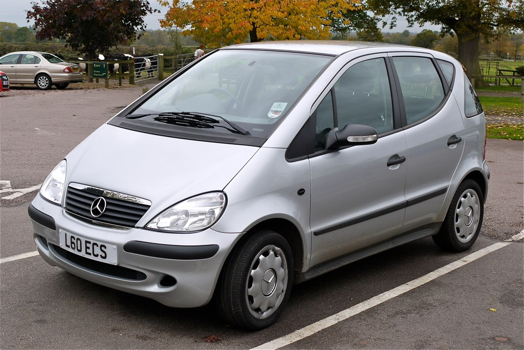 Panasonic G1 14-45 Lens